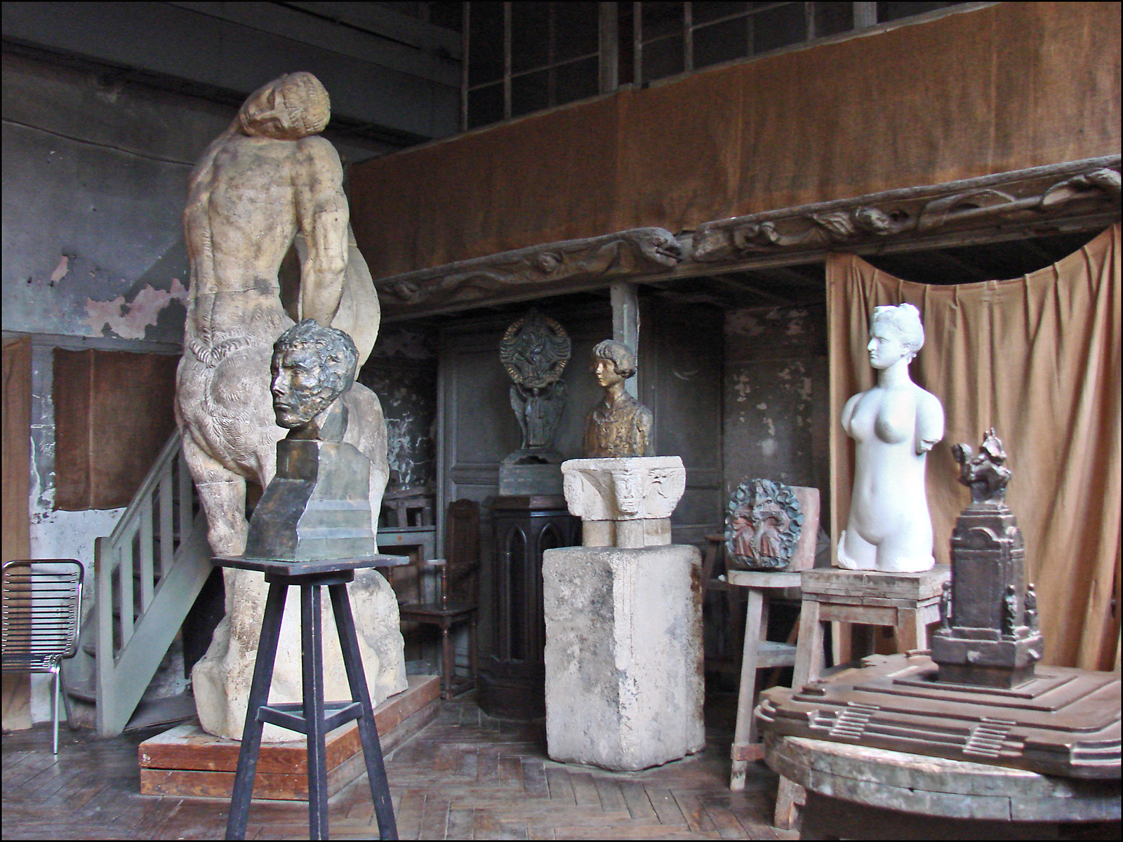 Au centre de l'atelier, le plâtre du Centaure mourant (1911-1914) "Investi en 1885 par le sculpteur, cet atelier, admirablement préservé, atteste, encore aujourd’hui, du charme du lieu originel. Il est un fidèle témoignage de ce que pouvait être un atelier à l’orée du 20e siècle. La verrière, la « mezzanine », qui permettait à l’artiste d’appréhender ses œuvres sous un point de vue inédit, le silence de ce lieu clos offrent une atmosphère propice, presque atemporelle et loin de l’agitation de Montparnasse, à la méditation et au travail." (extrait du site officiel) Musée Bourdelle